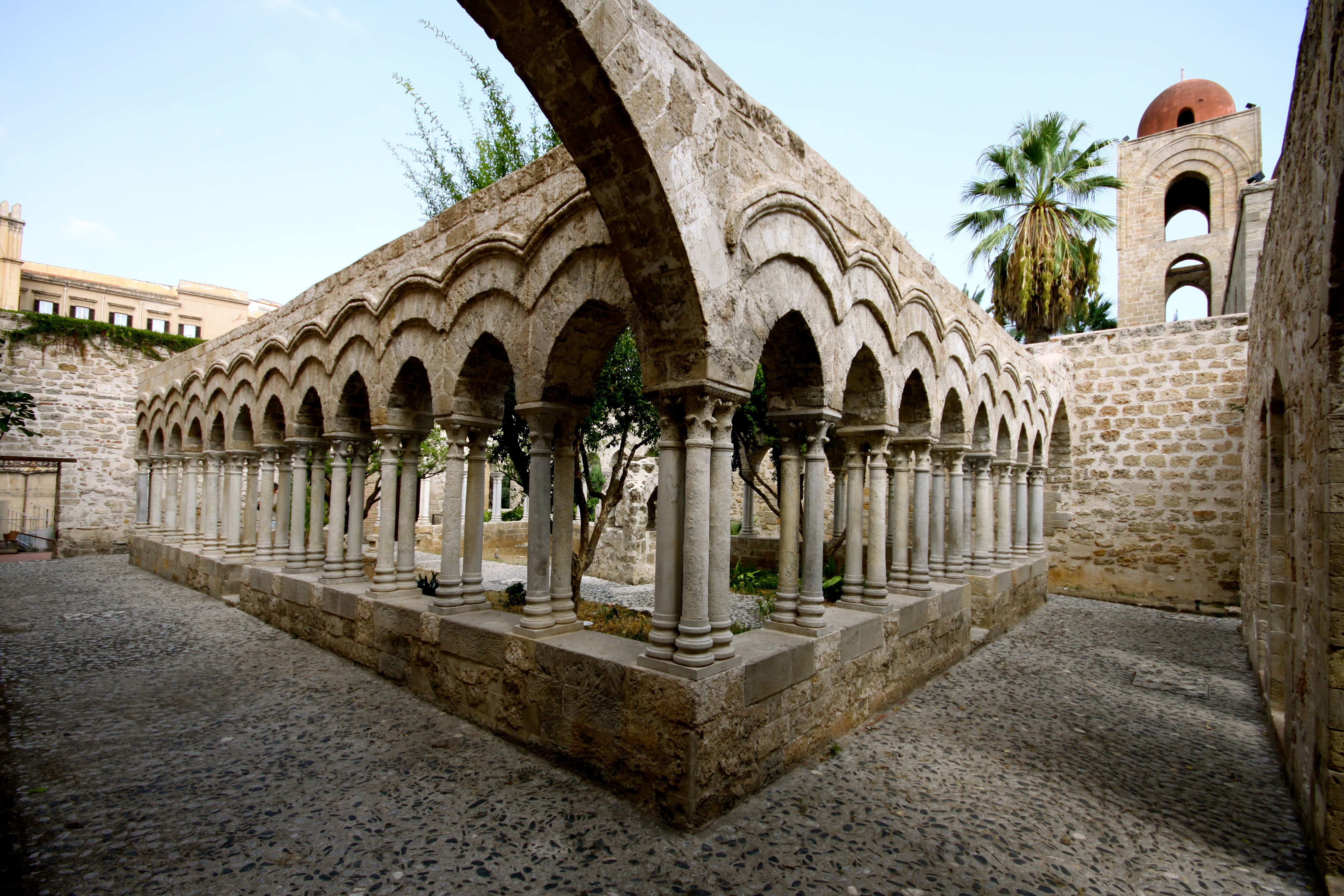 Cloister of San Giovanni degli Eremiti (Palermo)